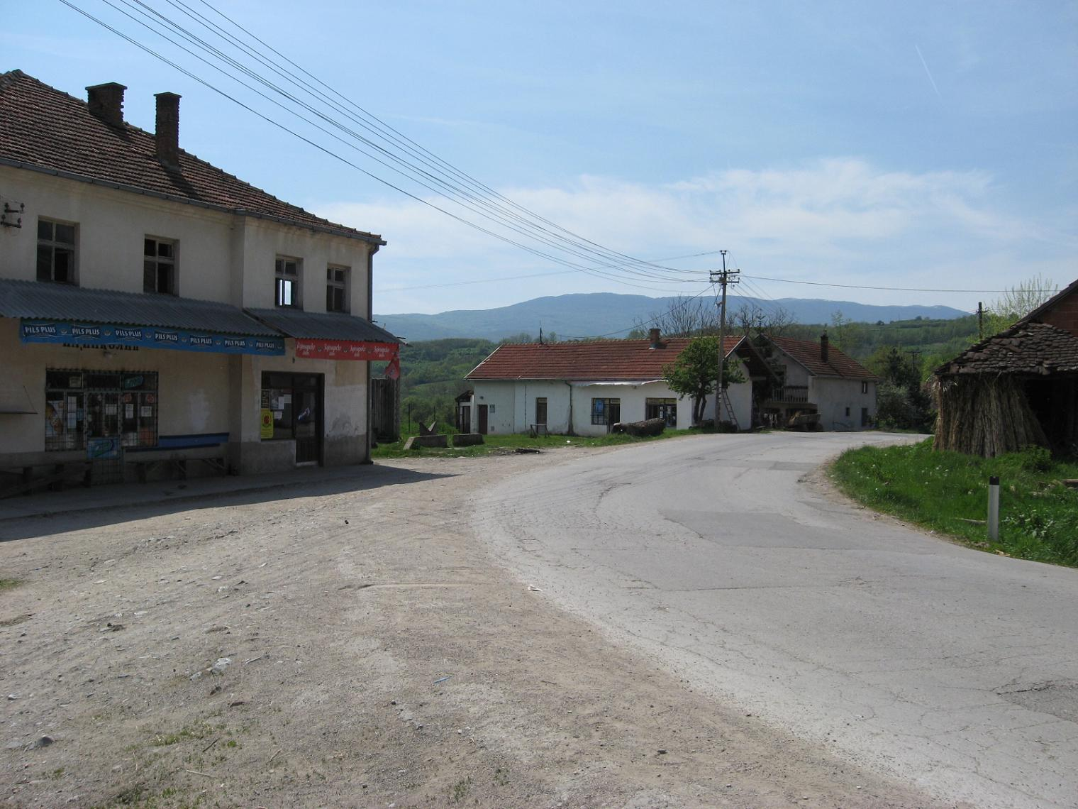 Доње Крњино центар сопствена слика Драган Цветковић Ниш